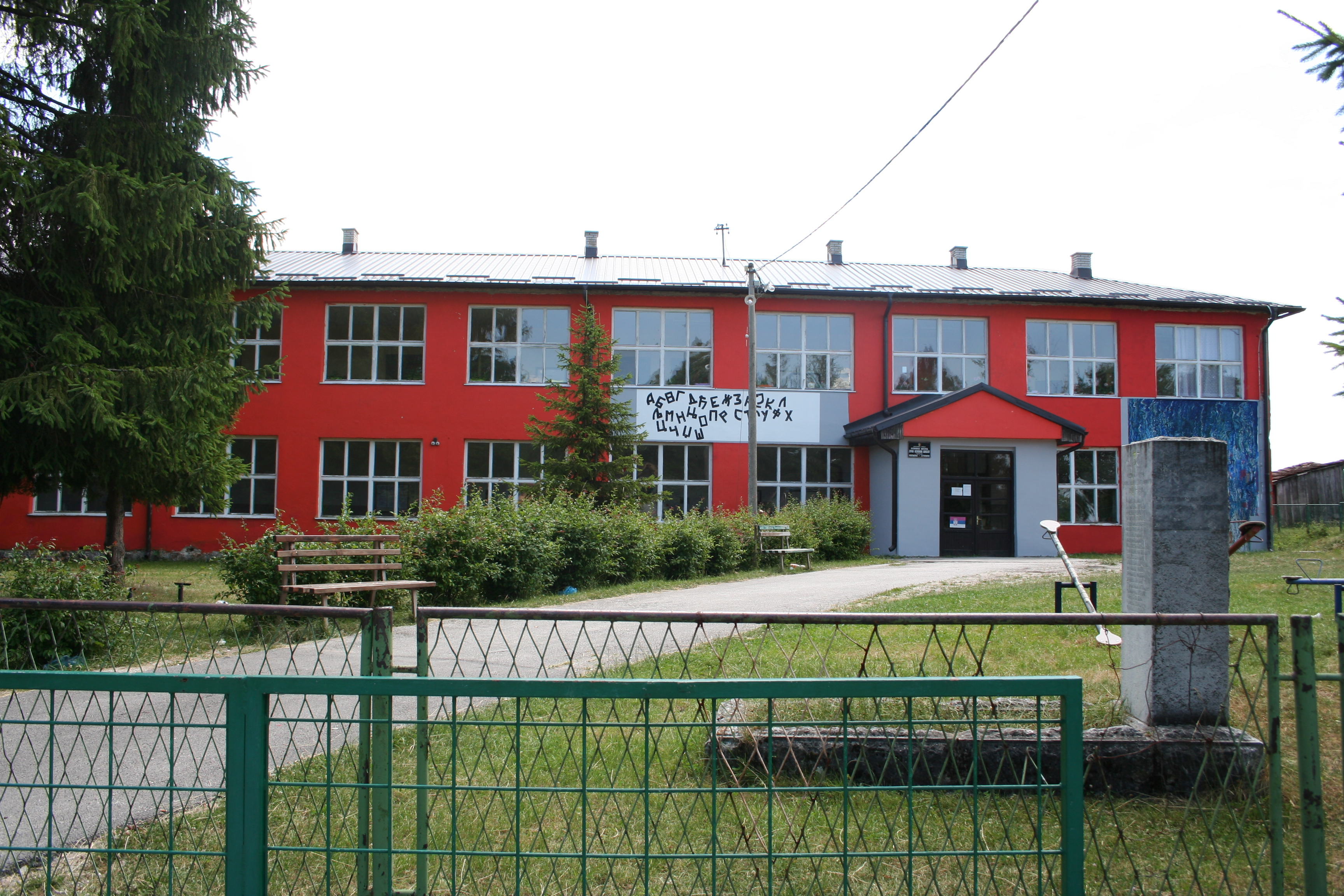 Stapari